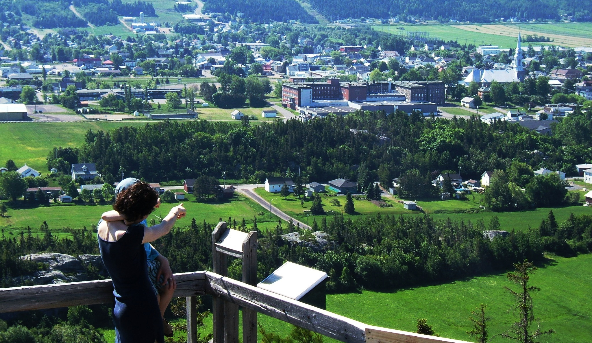 Ville de Saint-Pascal dans la MRC de Kamouraska au Québec, vu de la montagne à Cotton